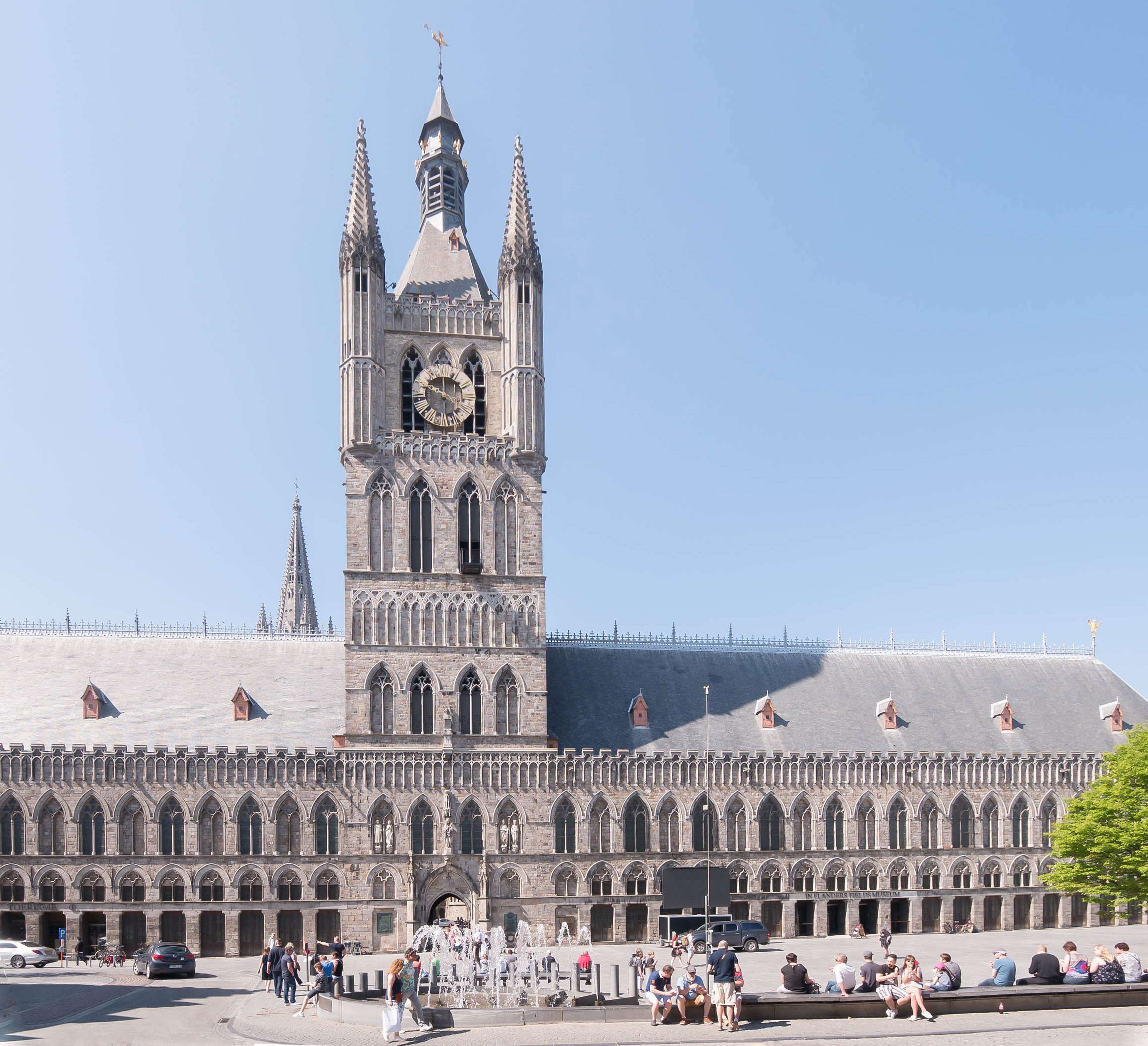 Die gotische Tuchhalle mit dem 70m hohen Belfried überragt den Großen Markt und beherrscht das Stadtbild von Ypern. Im Ersten Weltkrieg durch deutschen Artilleriebeschuss völlig in Trümmer gelegt, wurde die Gebäude in den 20er Jahren des 20. Jahrhunderts originalgetreu wiederaufgebaut.